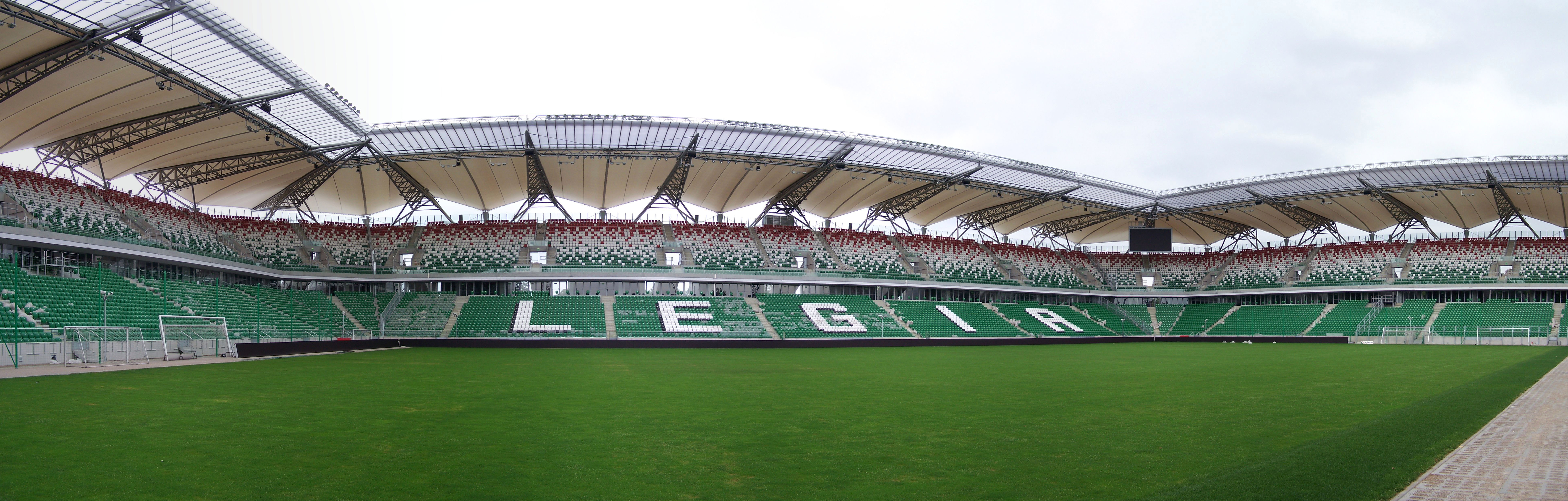 Renovated Polish Army Stadium (Stadion Wojska Polskiego) in Warsaw, Poland